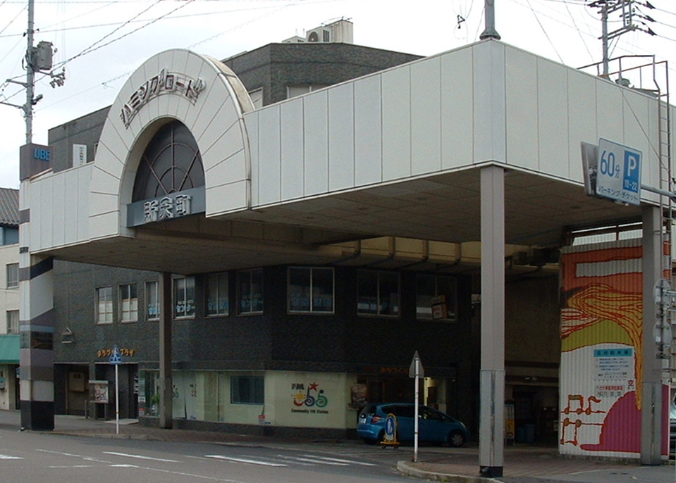 宇部新天町名店街西側入り口。2010年7月11日。